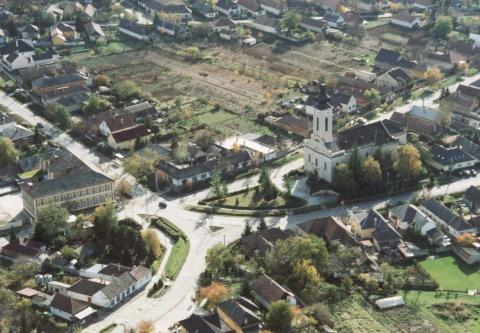 Isaszeg, Hungary, aerialphotography